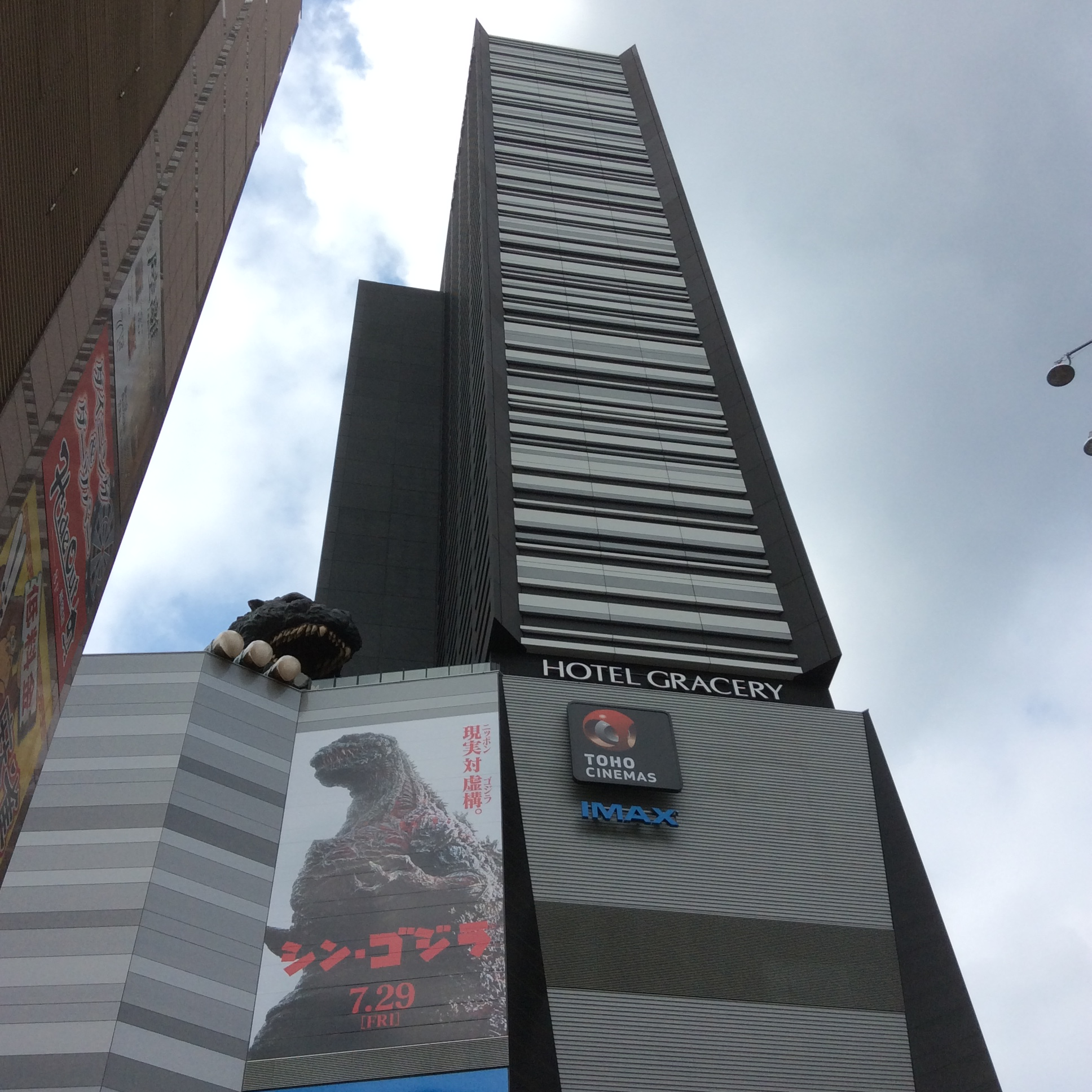 新宿東宝ビル